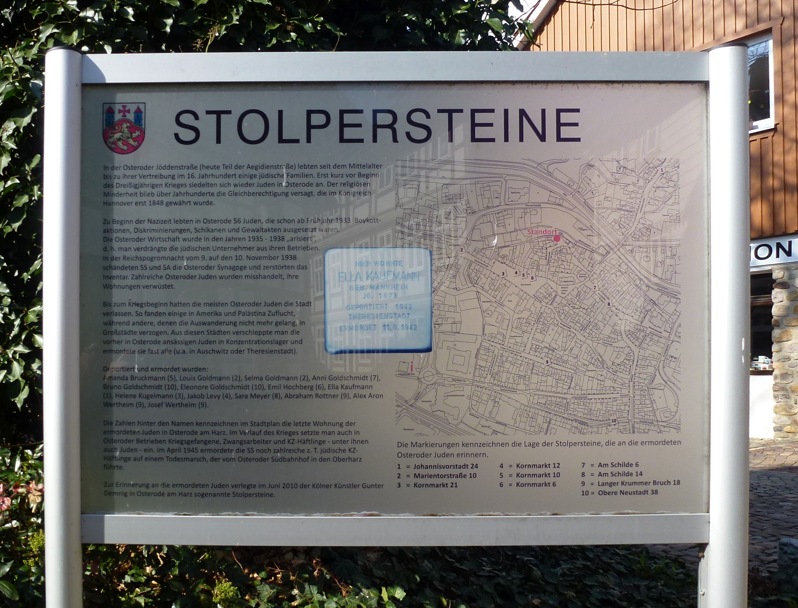 Infotafel an der Touristinformation über die Lage der Stolpersteine in der Stadt und der jüdischen Geschichte im Ort.